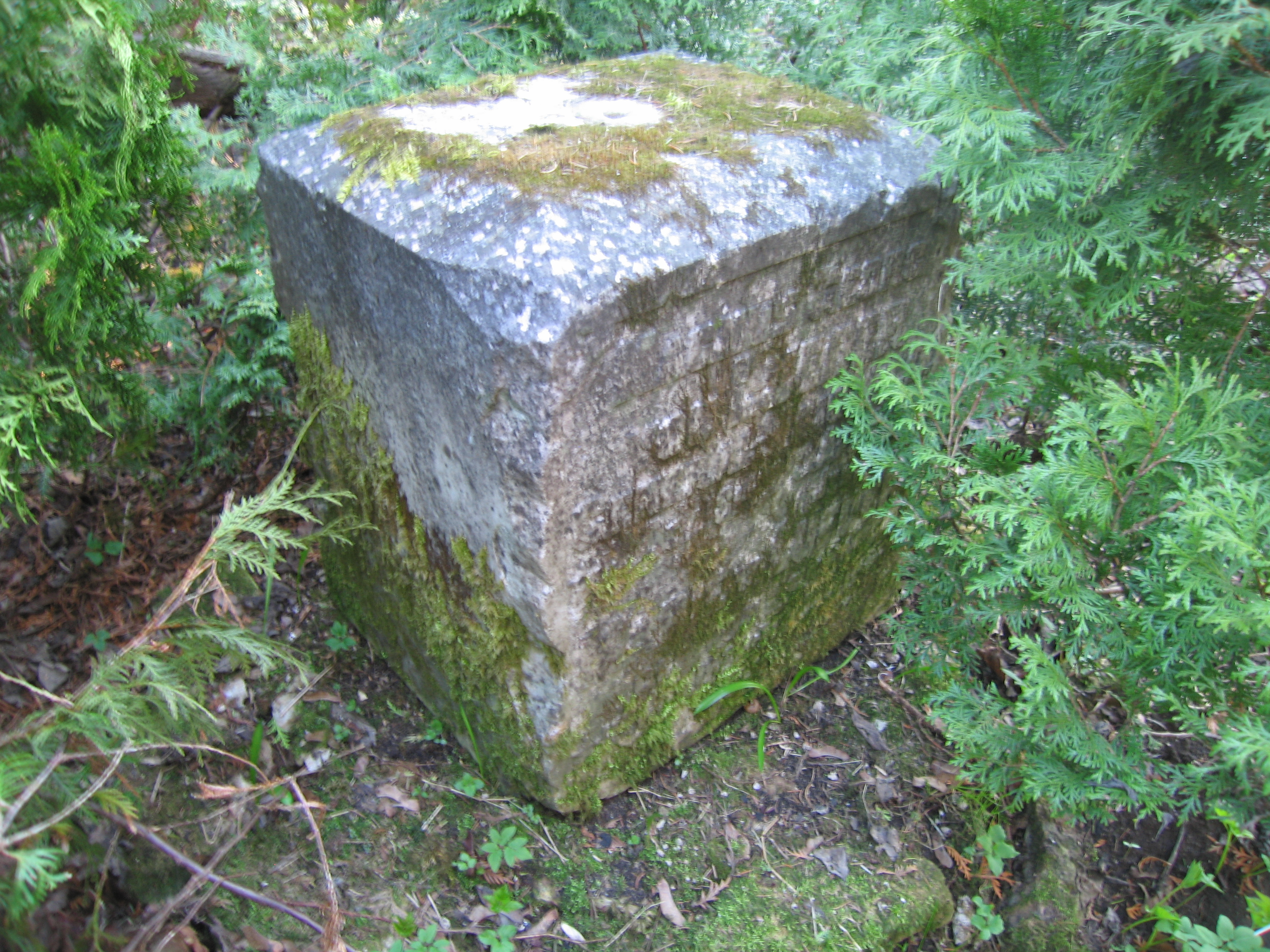 Hauatähis kalmistul. Foto: Robert Treufeldt, 30. aprill 2016